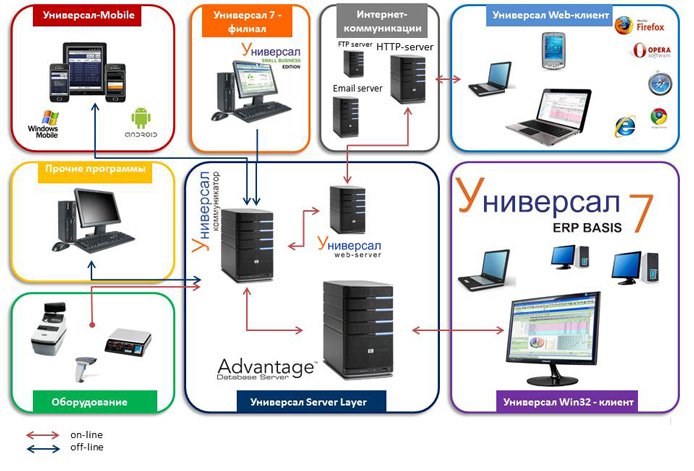 архітектура Універсал 7:ERP